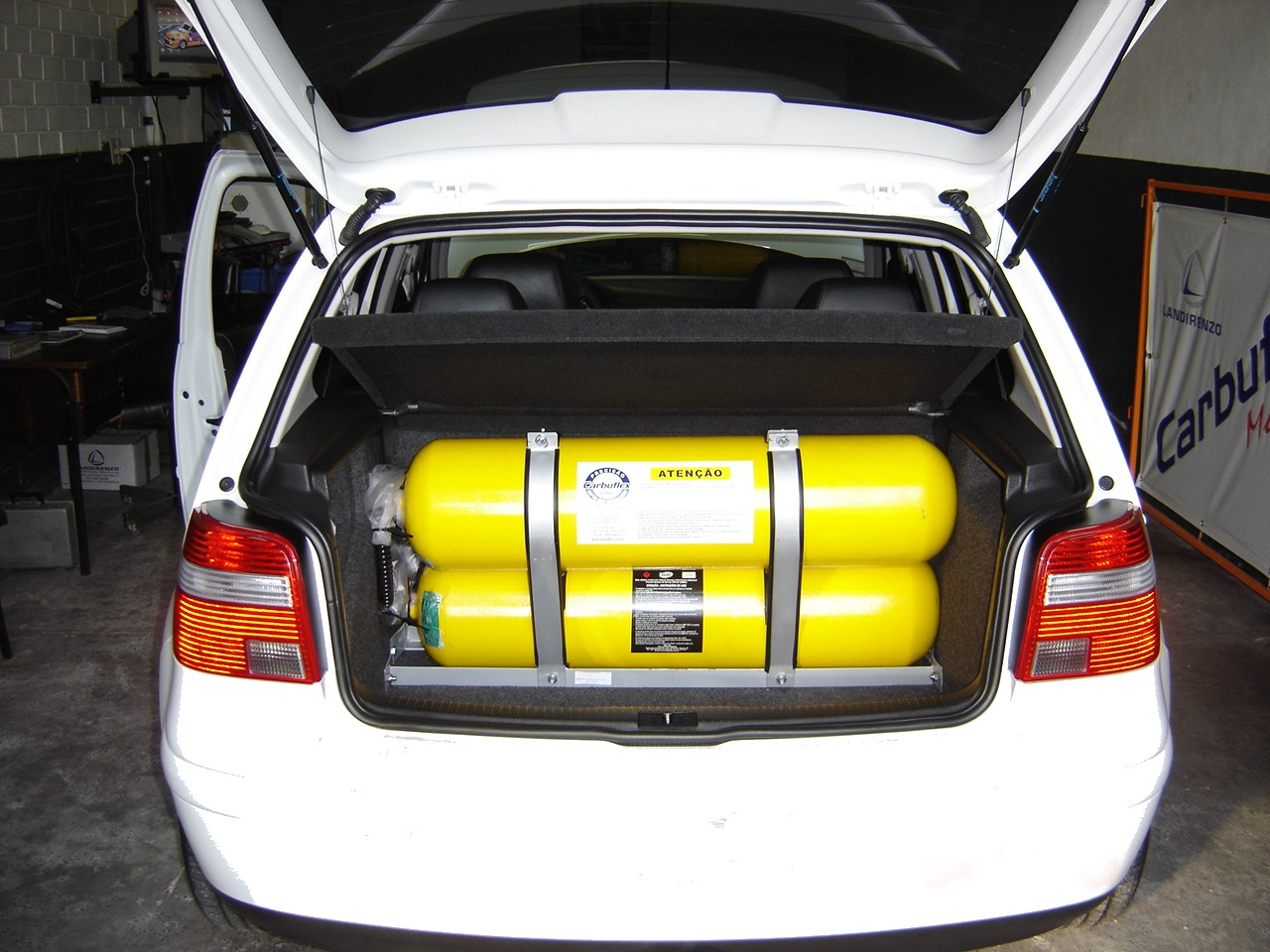 Danae Y Macarena a:D